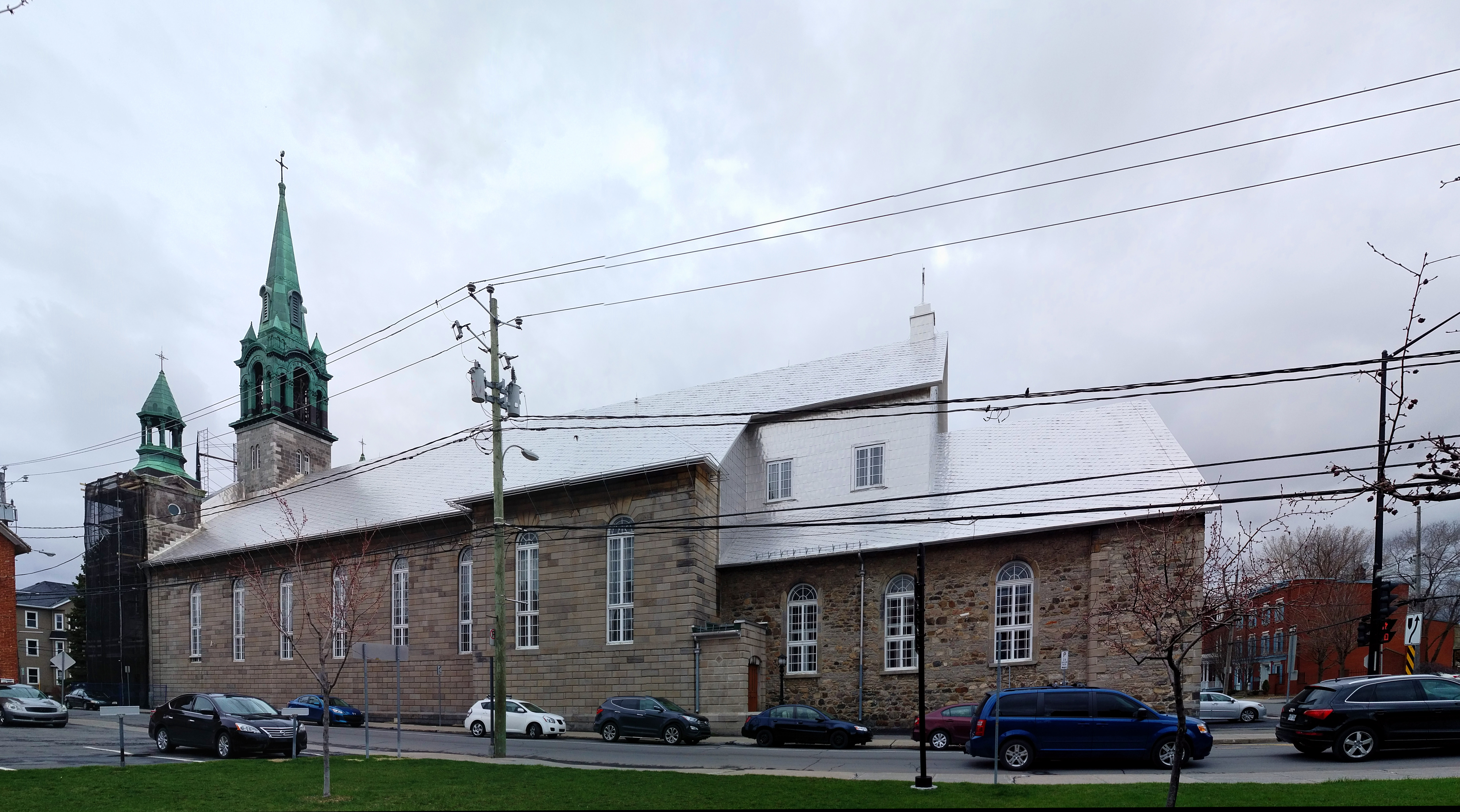 Saint-Jean-sur-Richelieu, vue de côté de la cathédrale Saint-Jean-l'Évangéliste.